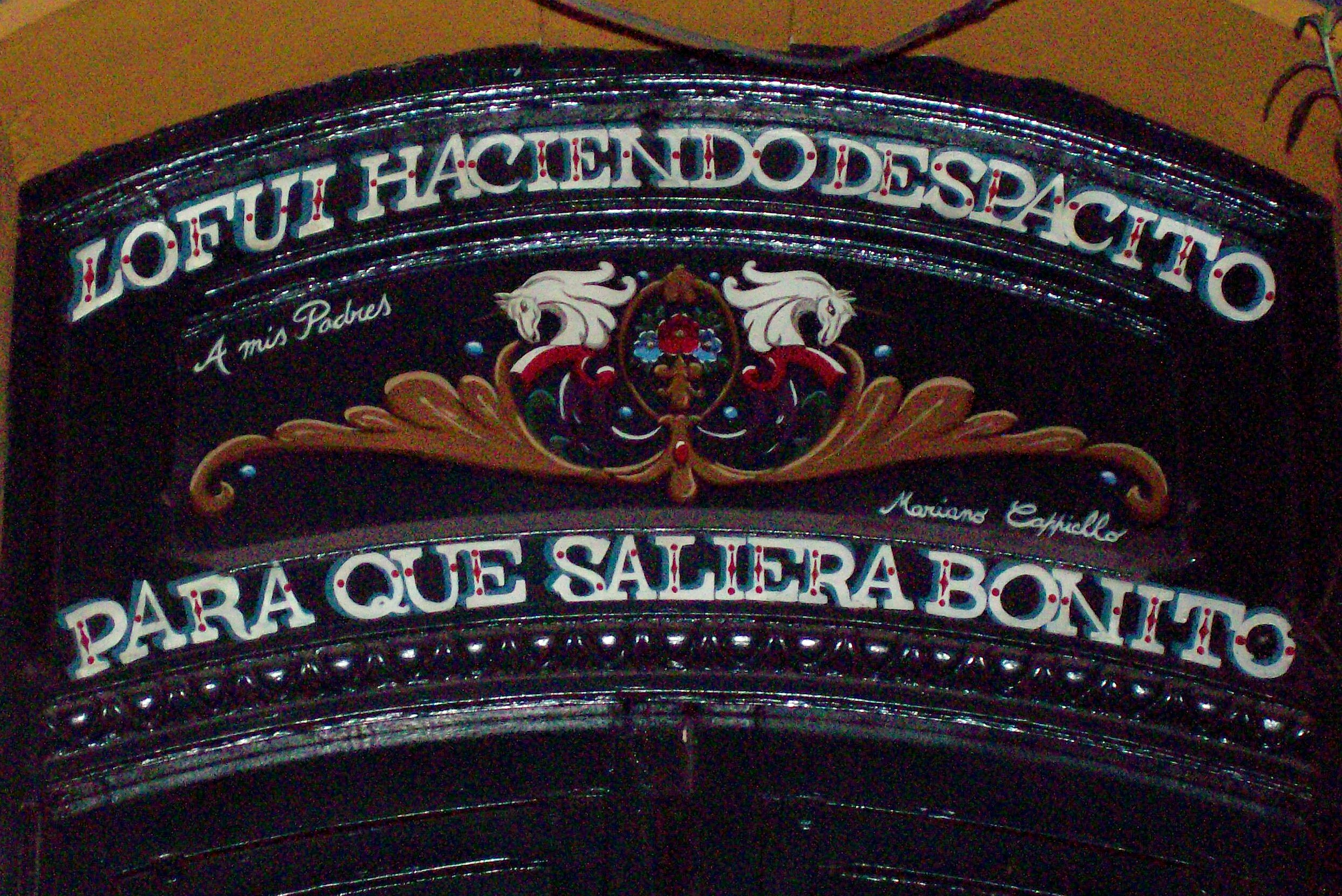 FILETEADO PORTEÑO: Frase, en ferretería de Avenida Pueyrredón, Buenos Aires.